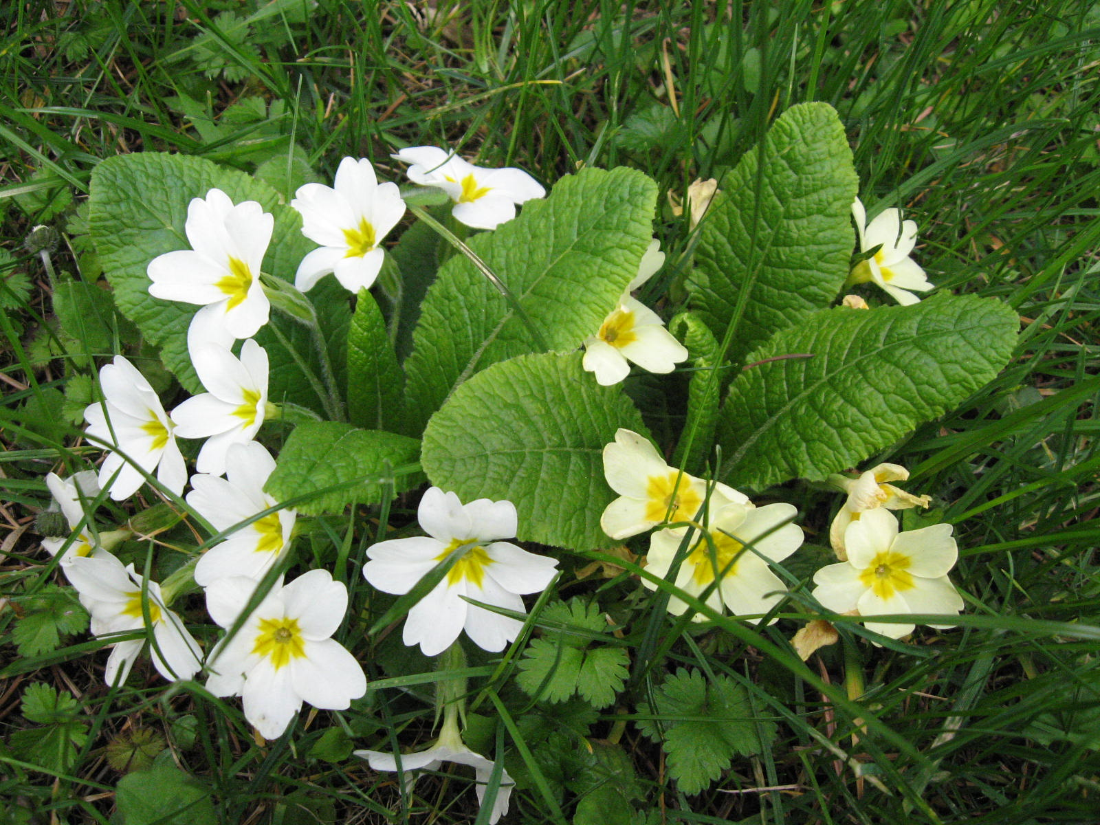 Stängellose Schlüsselblume (Primula vulgaris) mit leichtem Farbverlauf (Bastardisierung), weiß und hellgelb